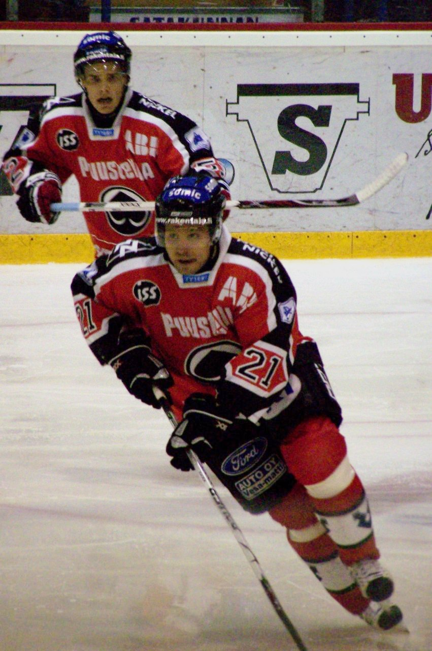 #21 Marko Kivenmäki and #52 Ville Uusitalo of Porin Ässät